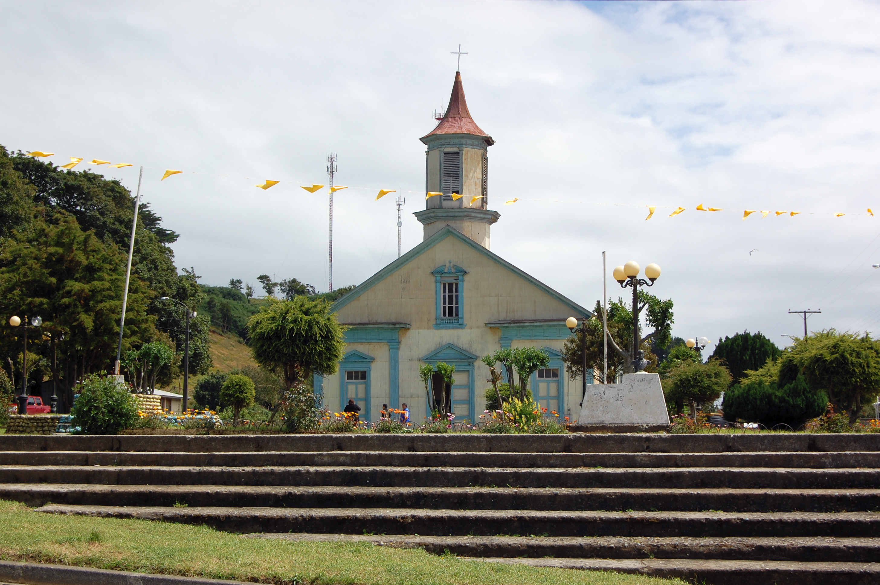 Iglesia de Carelmapu This is a photo of a national monument in Chile: 731